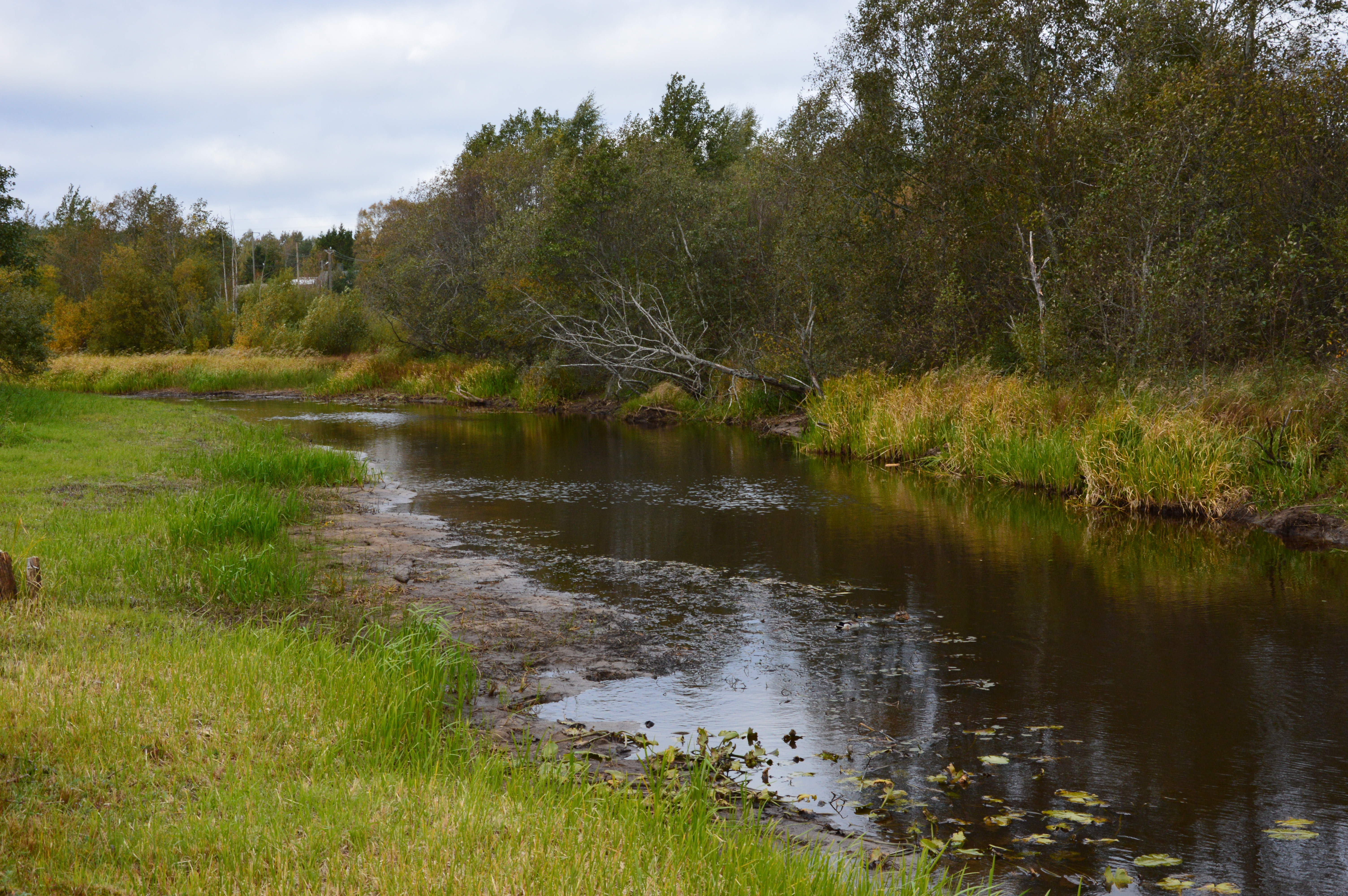 Alajõgi Alajõe külas.